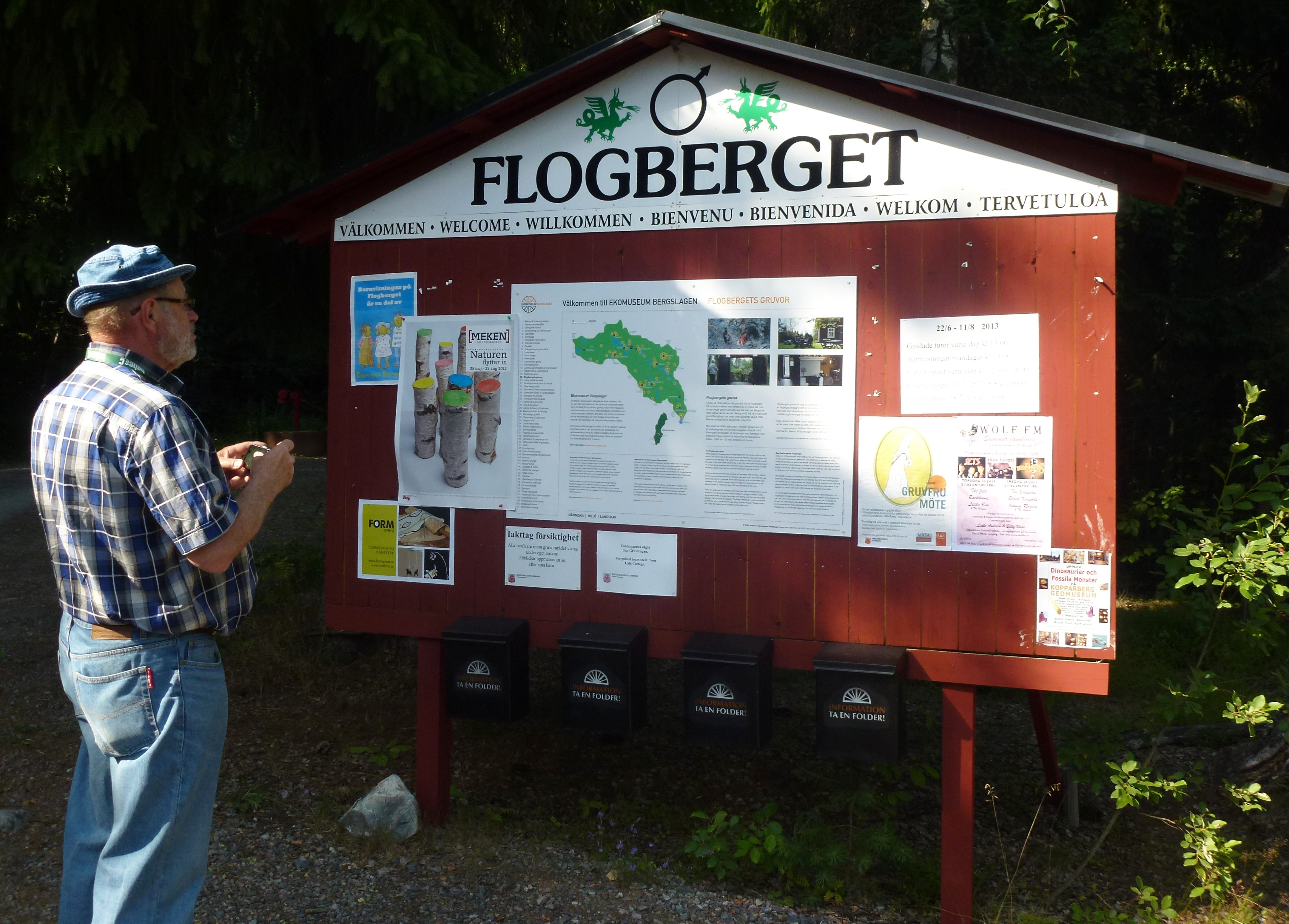 Flogbergets gruvor, infotavla